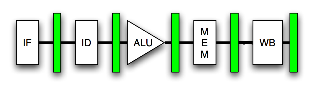 Pipeline generica a 5 stadi